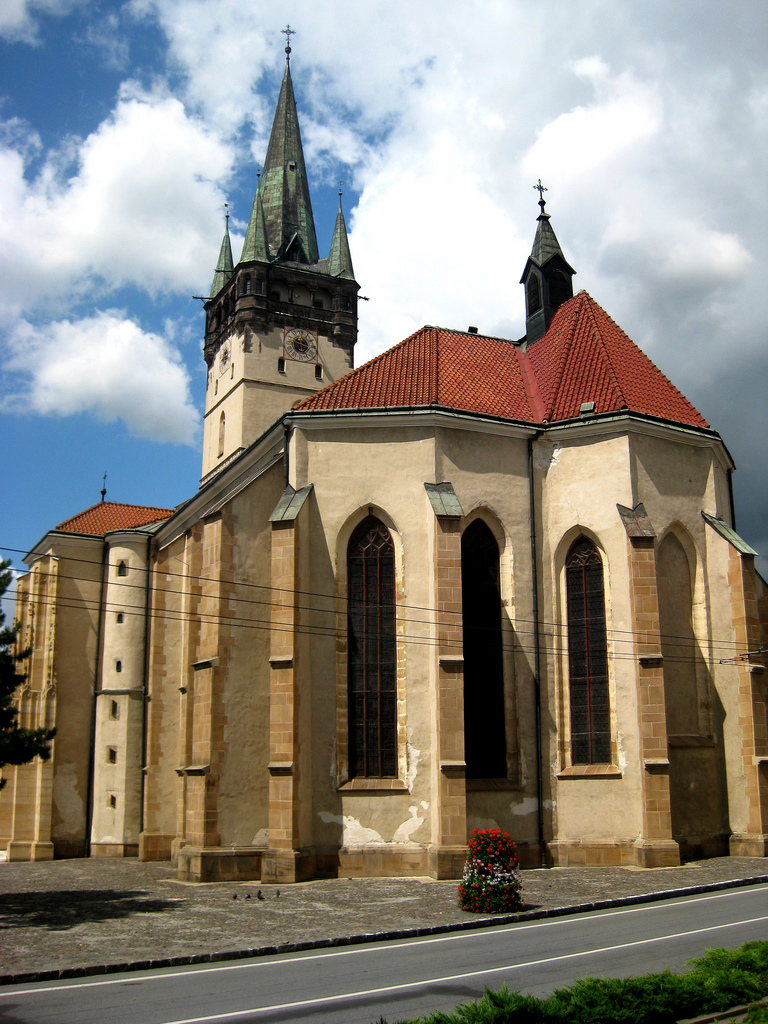 Konkatedrála sv. Mikuláša v Prešove z pohľadu od východu